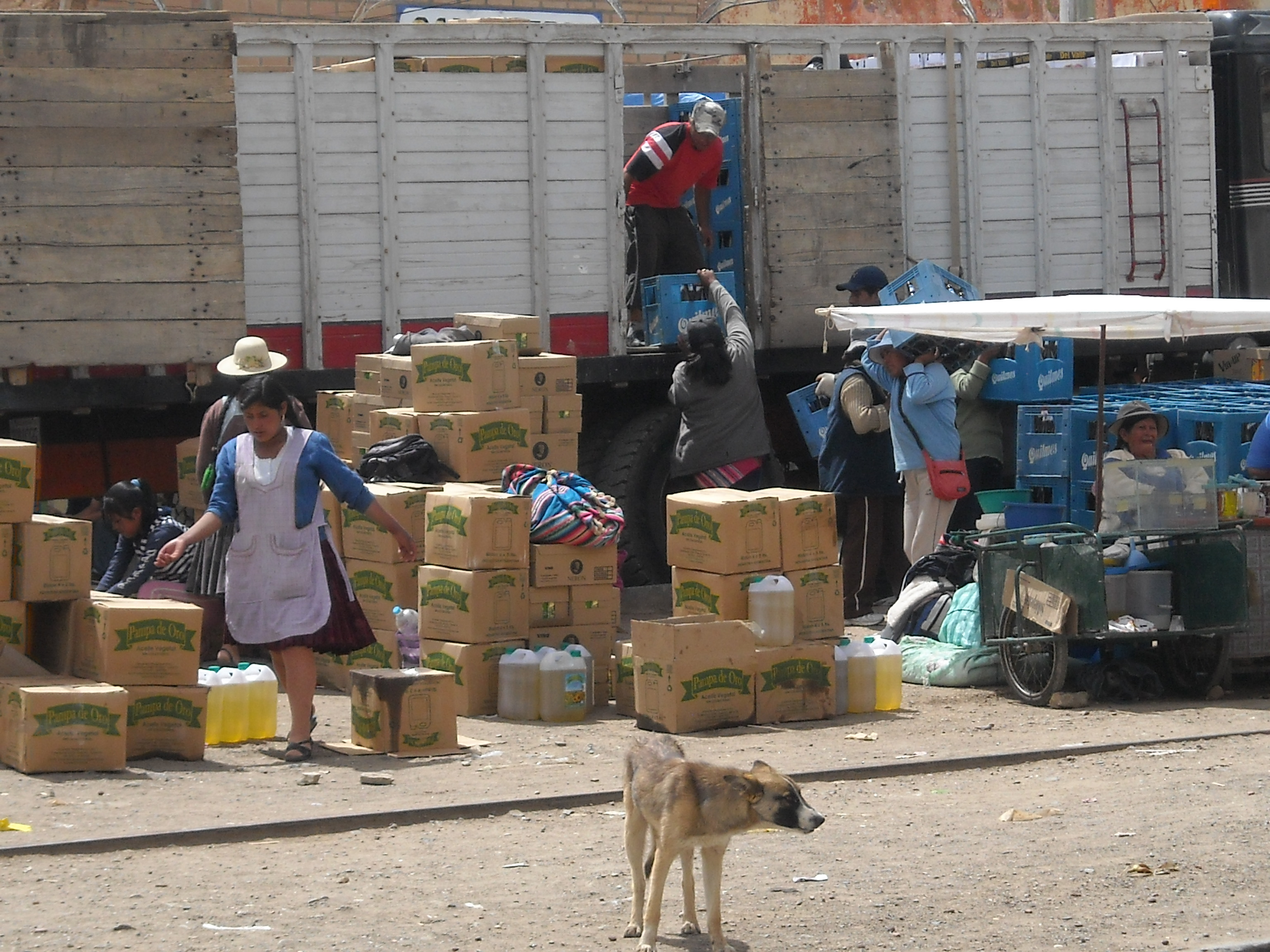 Город Вильясон на севере Боливии